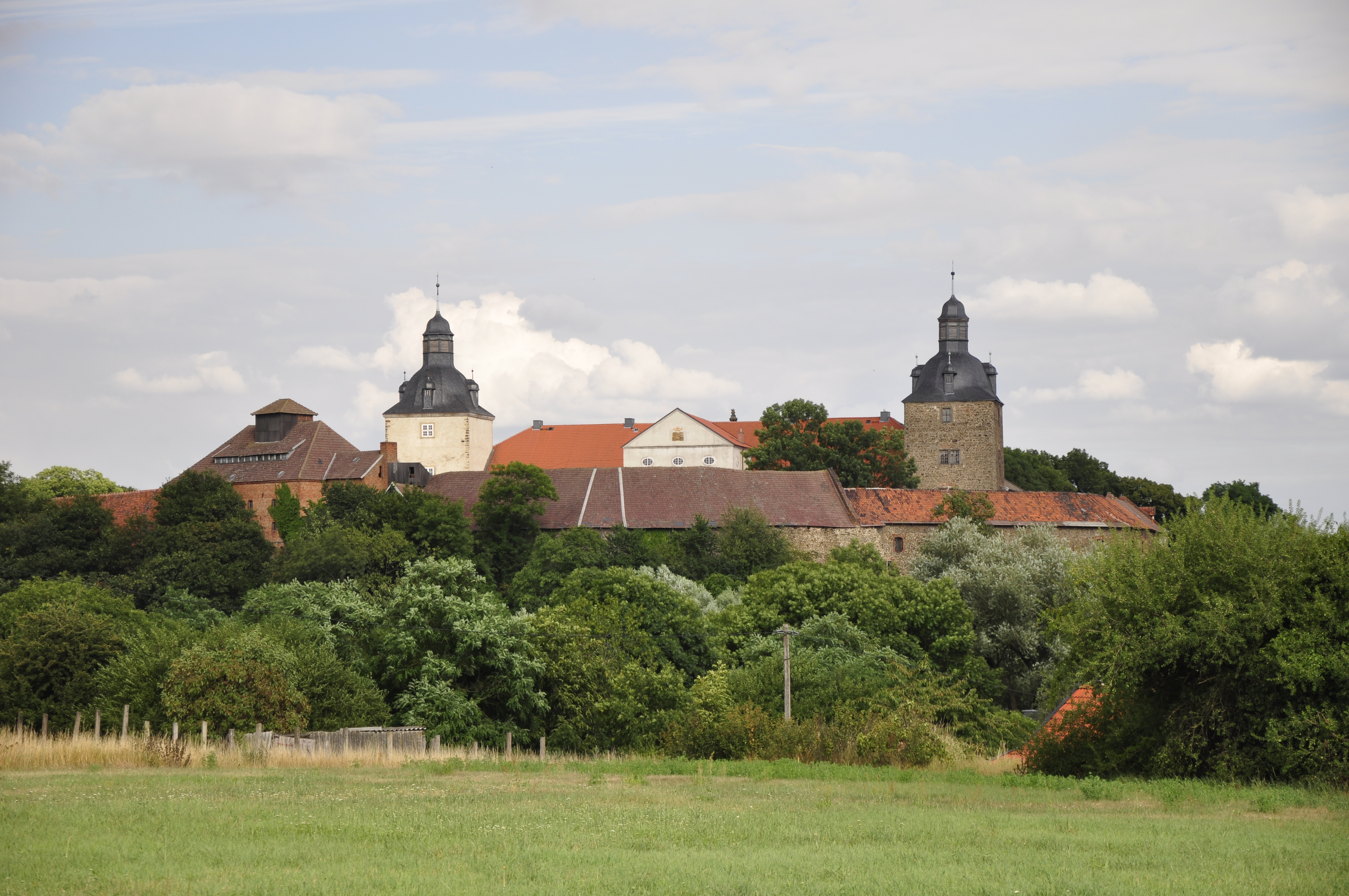 Hundisburg